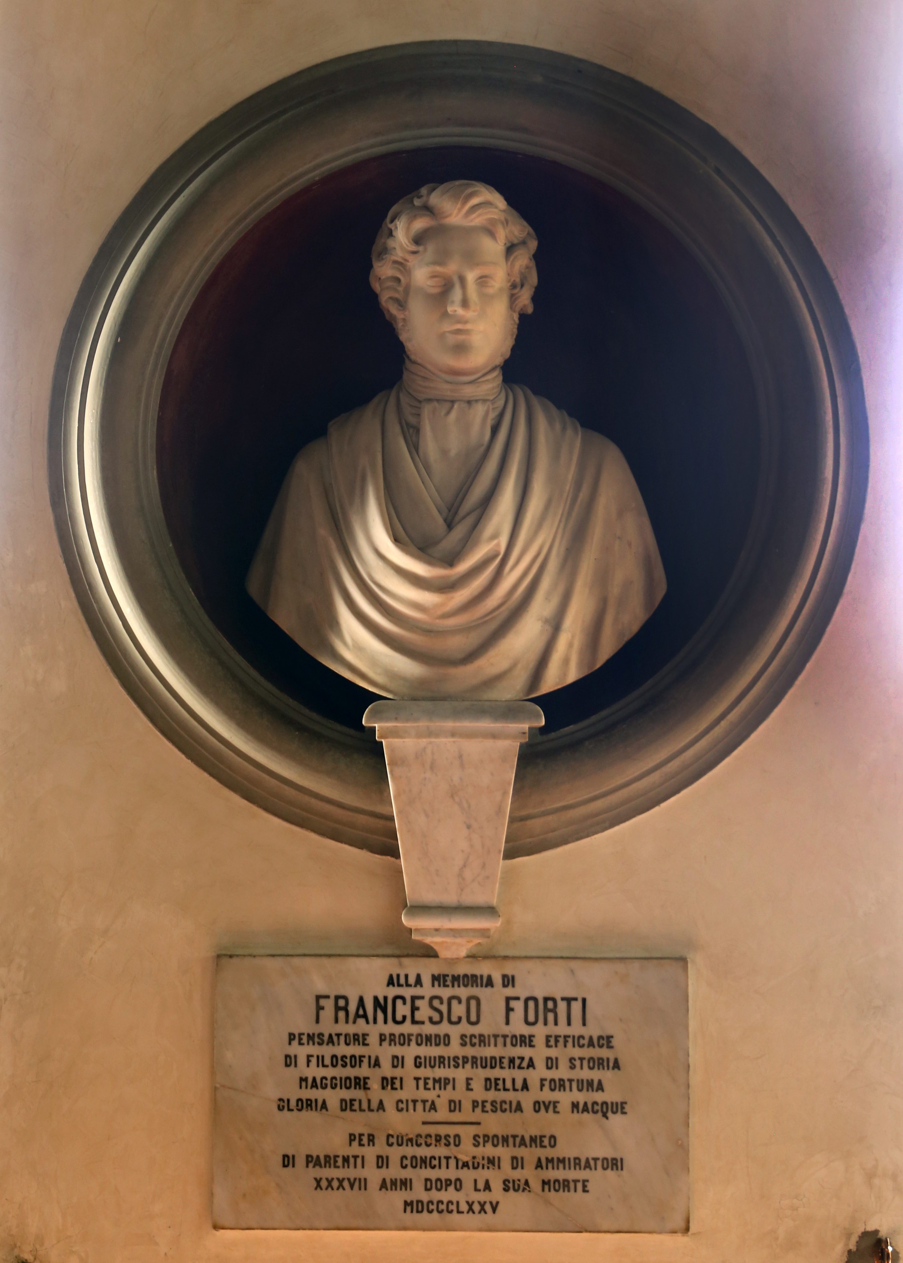 Palazzo del Vicario This is a photo of a monument which is part of cultural heritage of Italy.